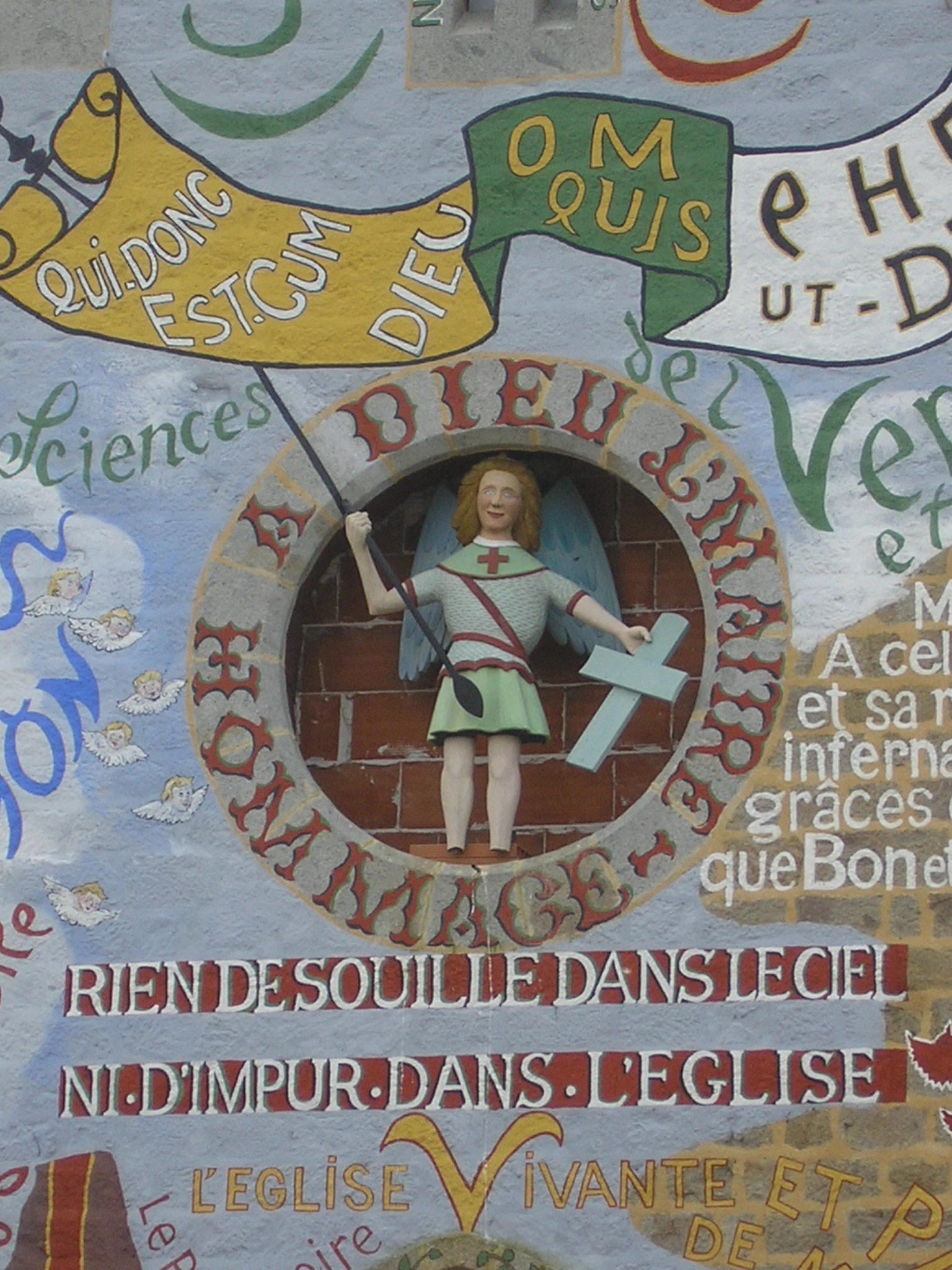 Détail_église-menil_gondouin(orne)